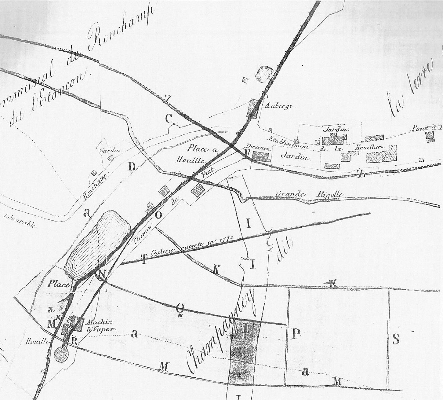 Plan ancien du hameau de la Houillère (Haute-Saône).